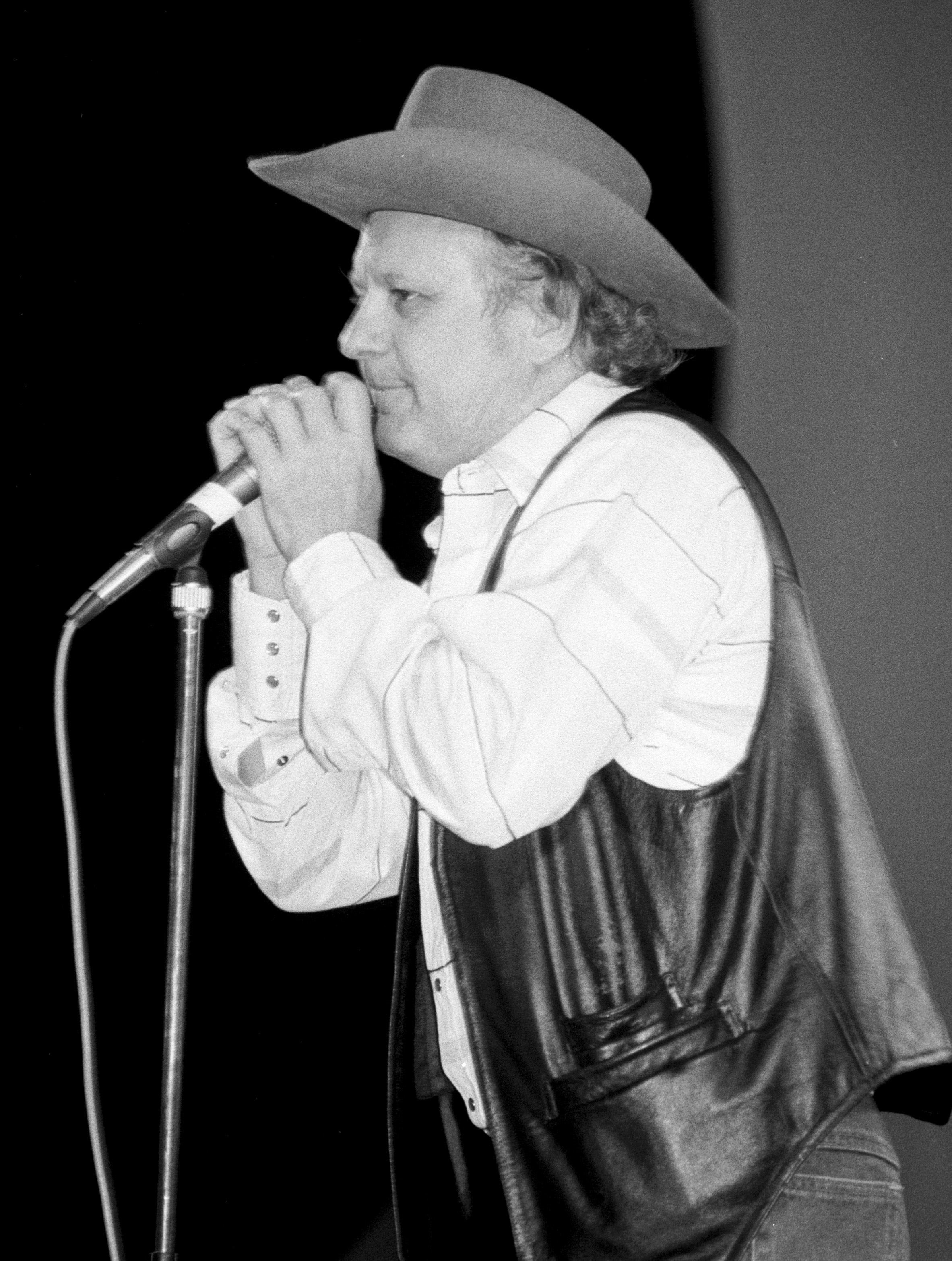 L'harmoniciste américain Charlie McCoy en concert à Deauville (Normandie, France) en 1990.